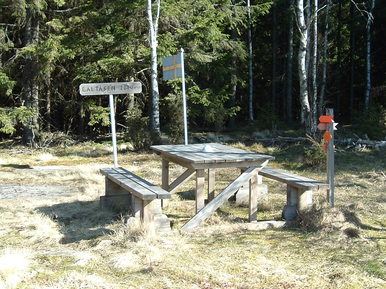 Västra Götalands näst högsta punkt